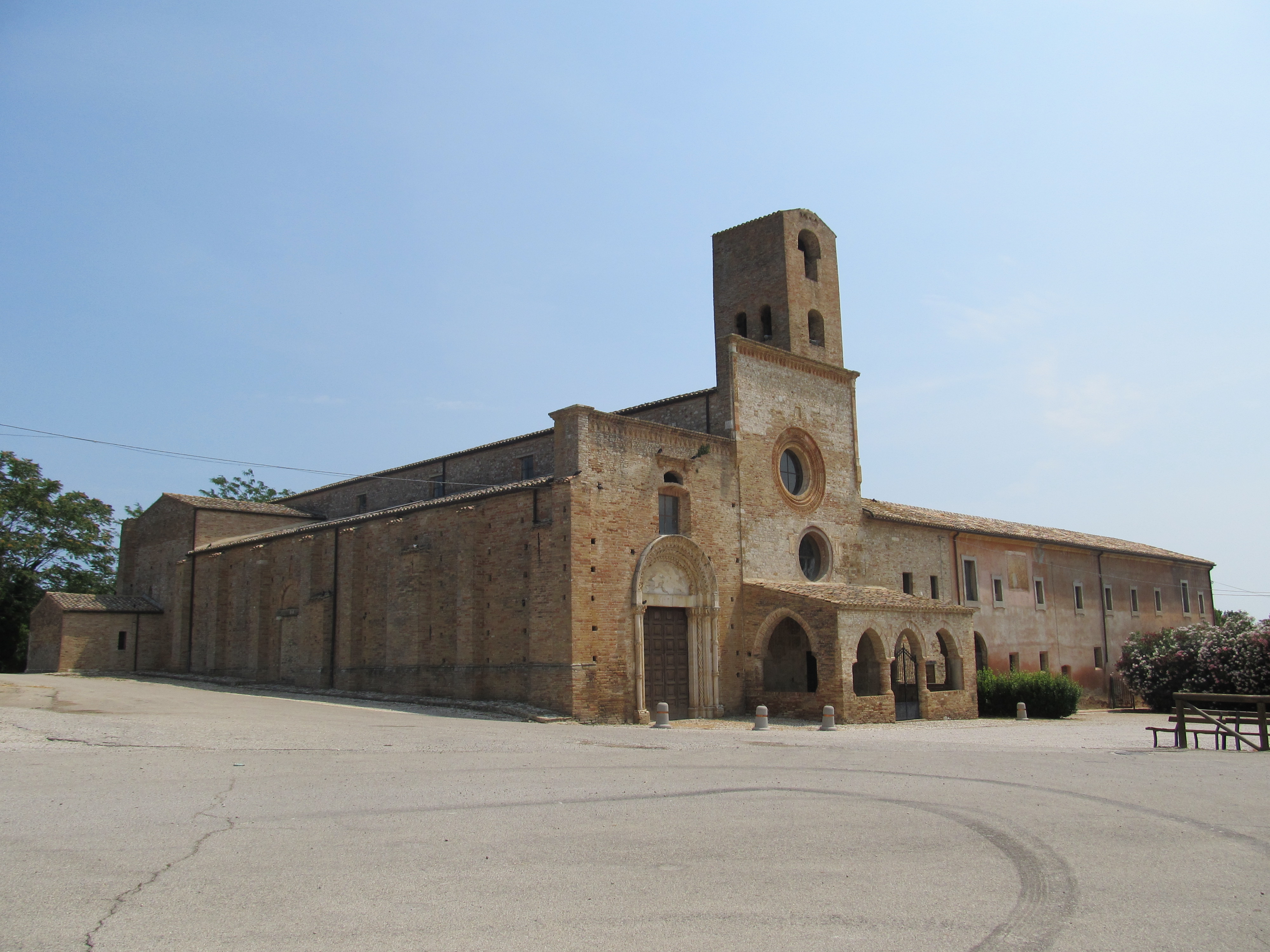 Propezzano, frazione di Morro d'Oro: gli edifici rimasti dell'originaria abbazia benedettina di Santa Maria di Propezzano.